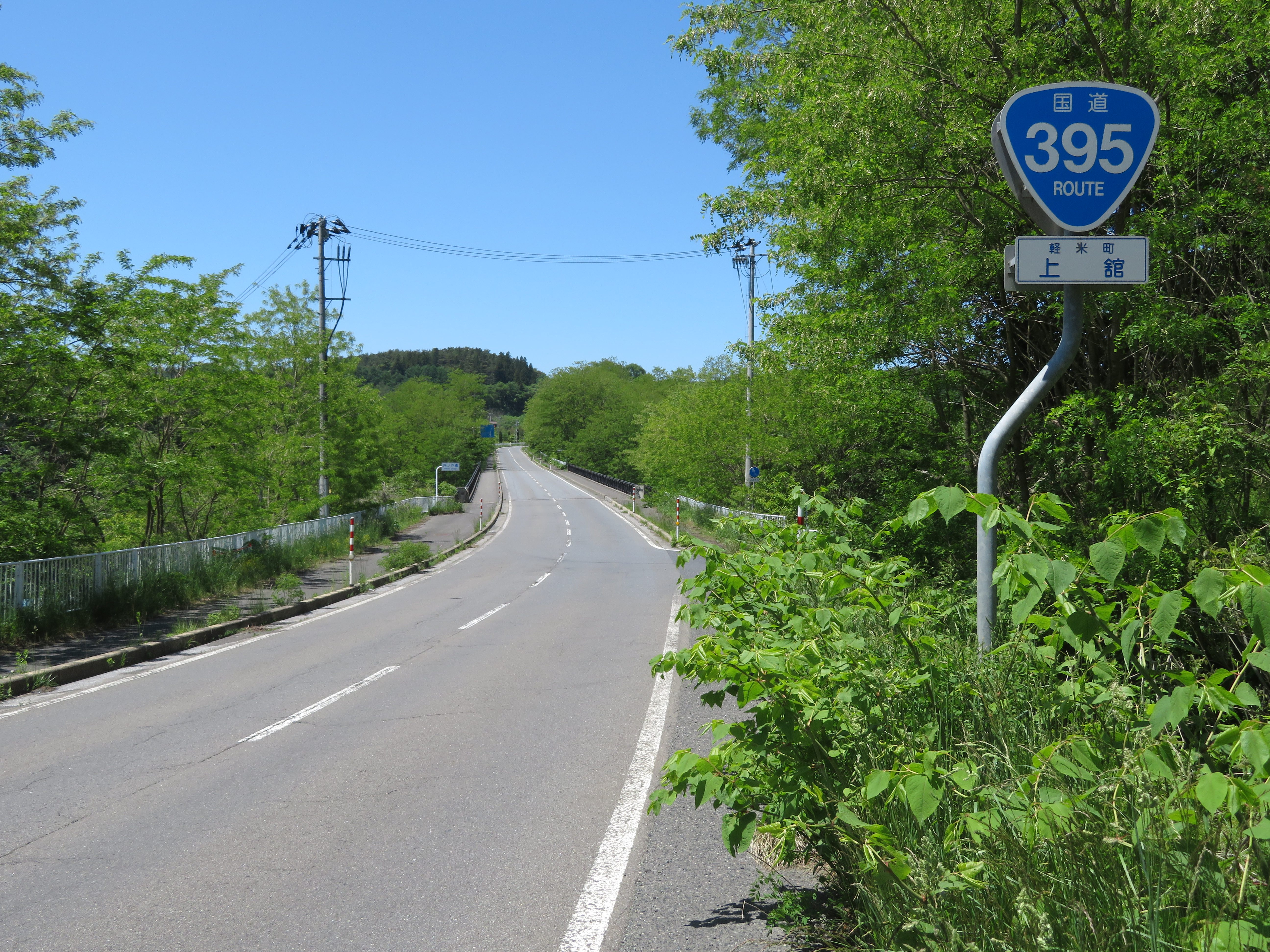 国道395号軽米バイパス（岩手県九戸郡軽米町上舘第19地割付近（軽米方面を撮影） Canon PowerShot SX720 HS